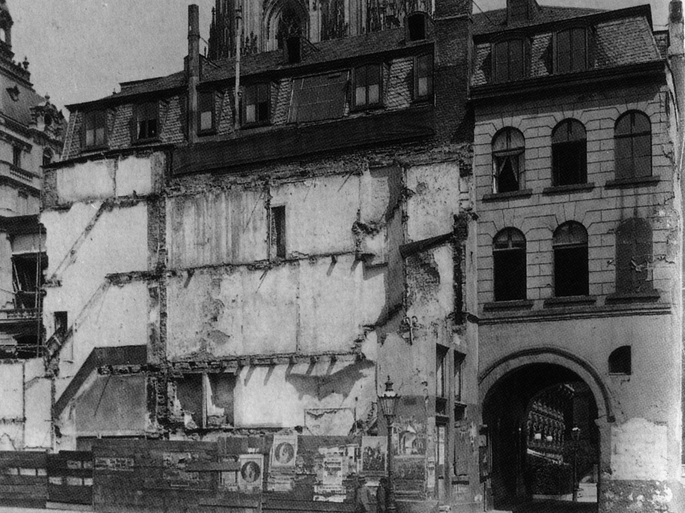 Köln, Abriss der "Hacht" 1893